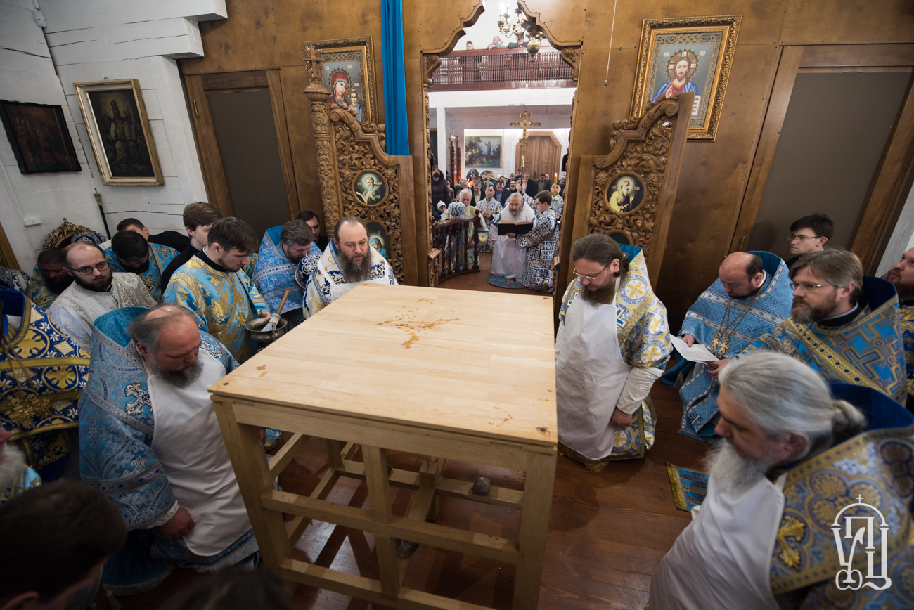 Освящения храма в честь великомученика Димитрия Солунского в Жулянах